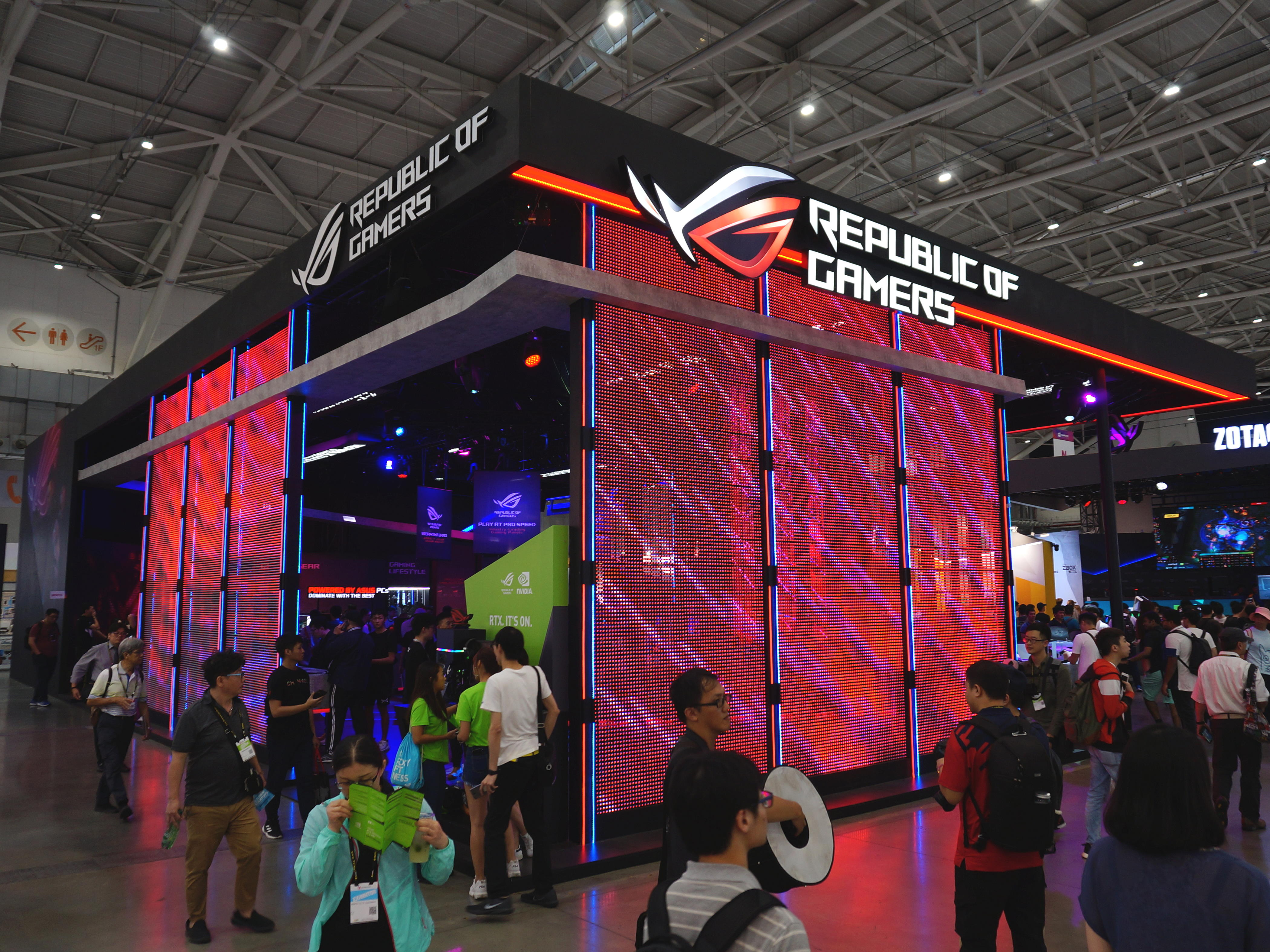 中文（台灣）: 2019台北國際電腦展，華碩電腦玩家共和國系列產品攤位。